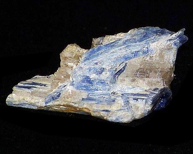 kyanit_4,5 x 3 cm